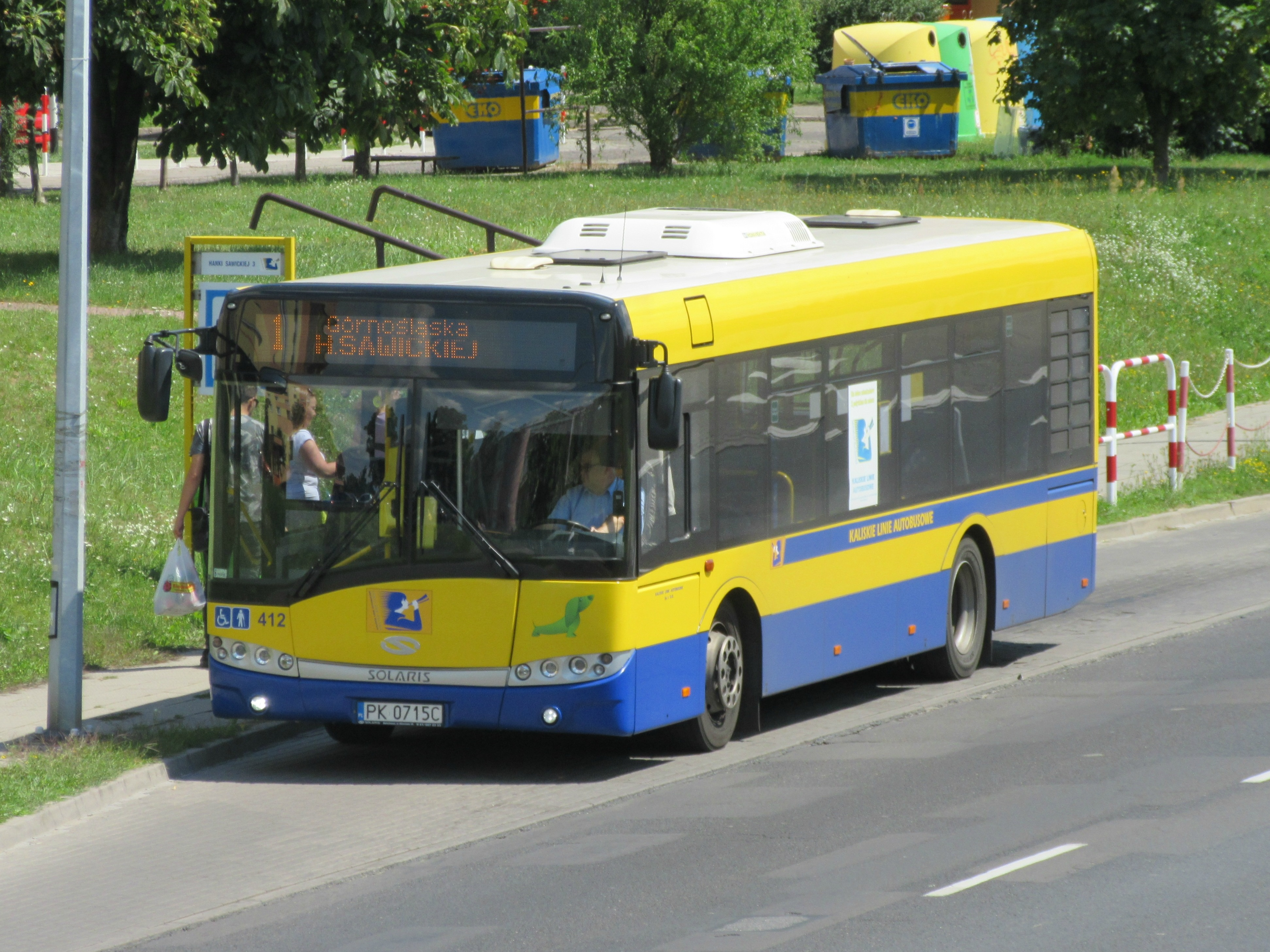 Solaris Urbino 10 Kaliskich Linii Autobusowych na przystanku Sawickiej Arena (ob. Wyszyńskiego Arena) w Kaliszu